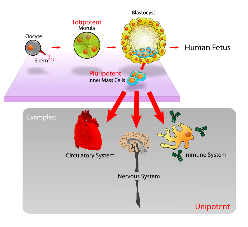 Izvor pluripotentne matične ćelije od embriona u razvoju.